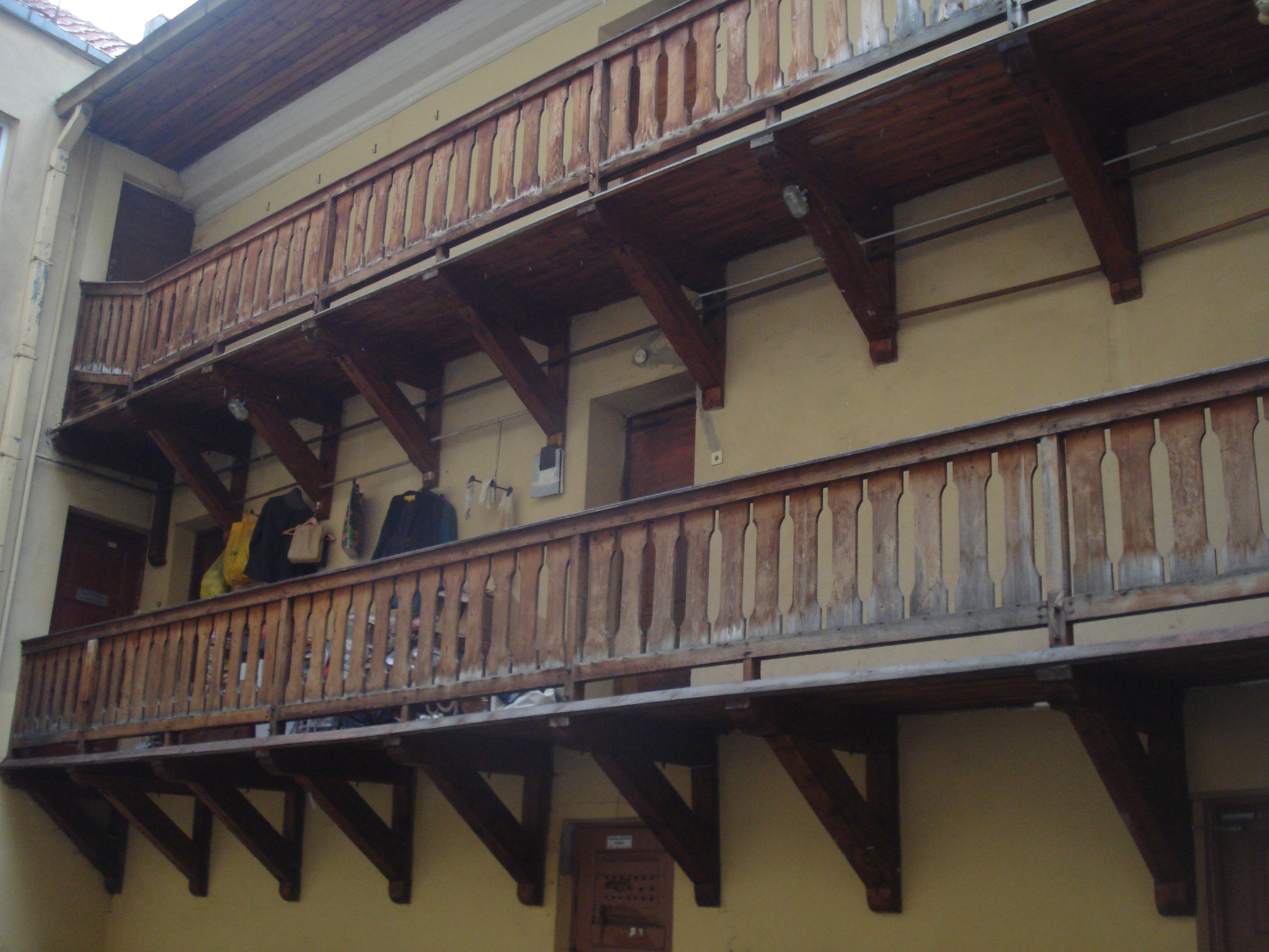 Дворец Гурецких. Вильнюс, Доминикону 15 / Гаоно 1